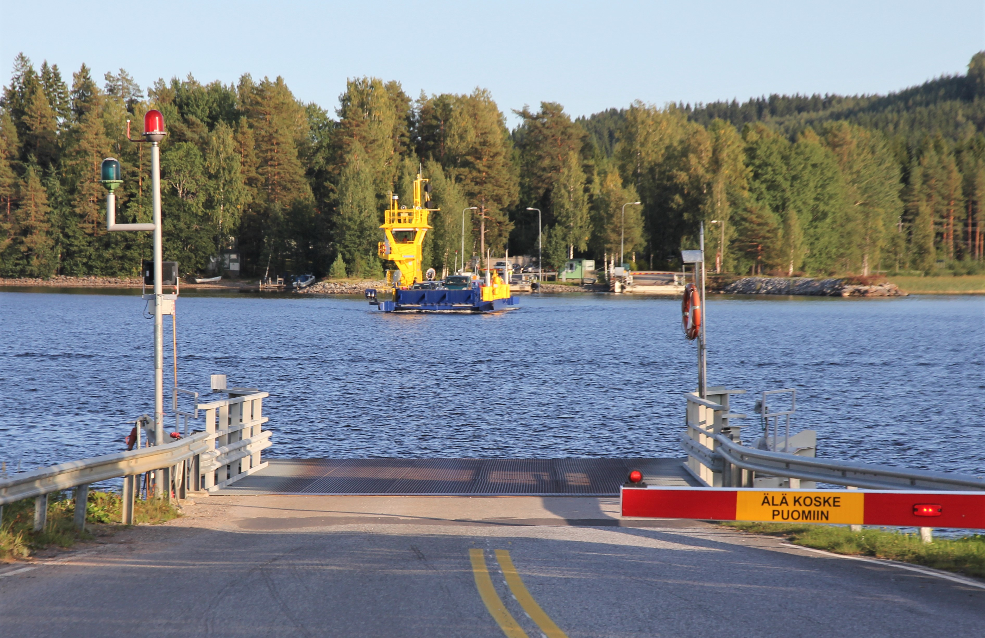 Puutossalmen lossi saapumassa Vehmersalmen puolelta Puutossalmelle, yhdystiellä 5370. Kuopion Puutossalmi, lossista vasemmalle (pohjoiseen) sijaitsee Kallavesi ja etelään Sotkanselkänä tunnettu vesialue.